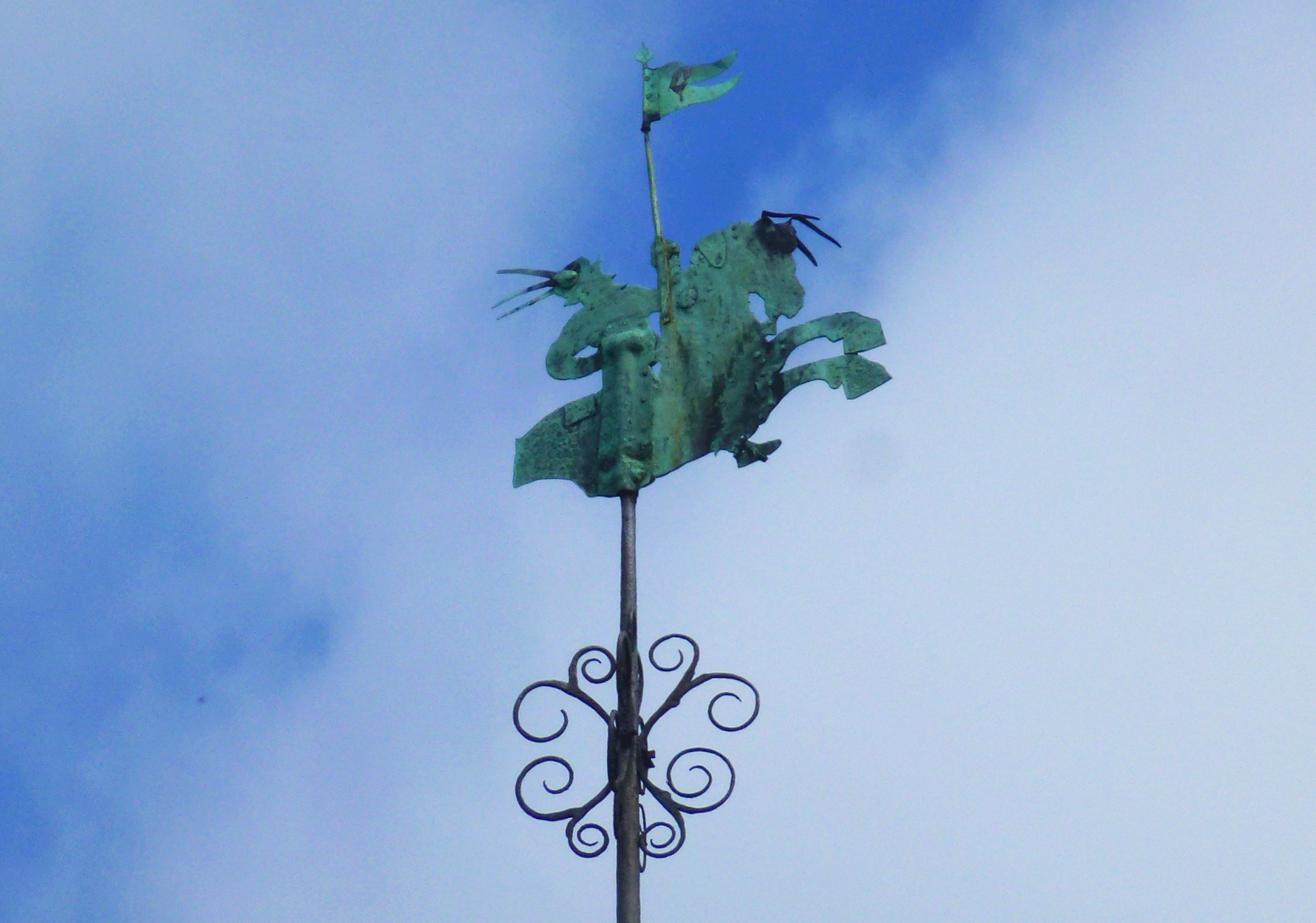 Schloss Ahrensburg Wetterfahne